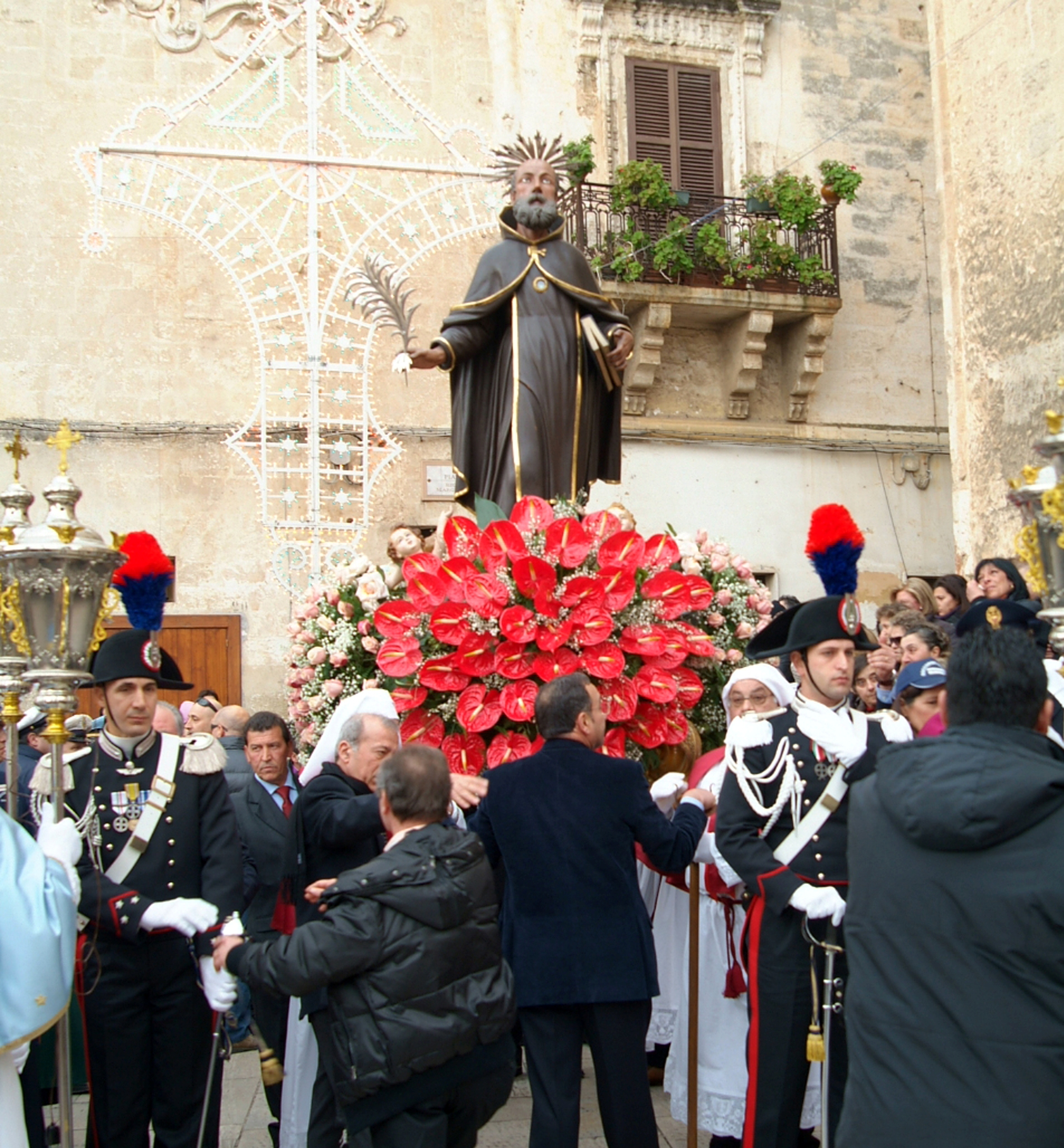 Inizio della processione di San Ciro, Chiesa Madre, Grottaglie (TA)